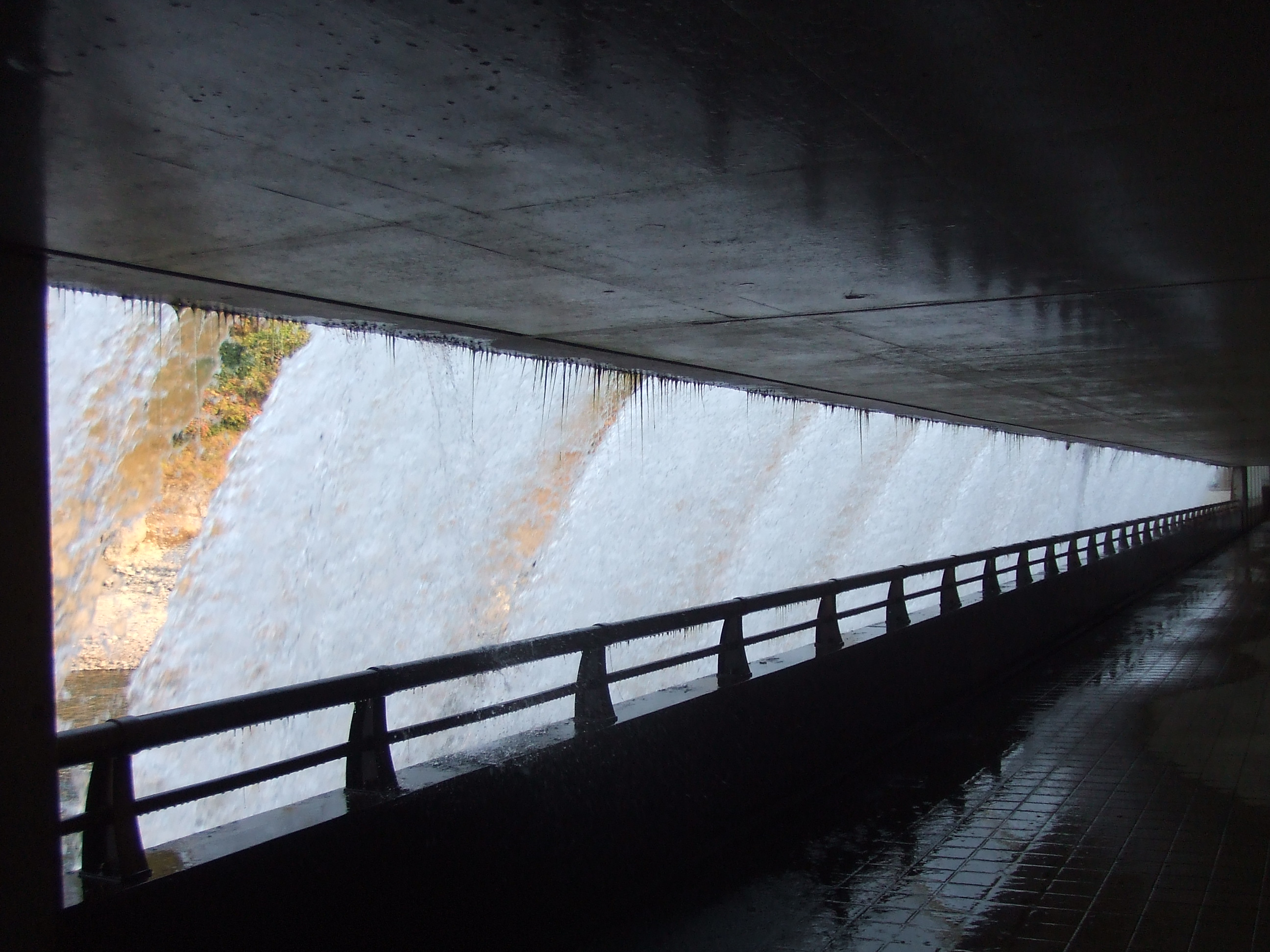 湯田貯砂ダム 堤体内にある通路の様子